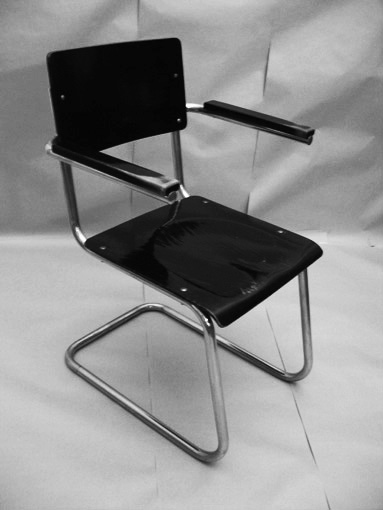 Original Mauser Modell RB 4, 1939. Der Designer wird von der Firma Mauser nicht benannt. Einer der ersten Freischwingerstühle der Firma Mauser. Die Produktion wurde im gleichen Jahr wieder eingestellt, da die Materialressourcen für die Kriegsproduktion gebraucht wurden.